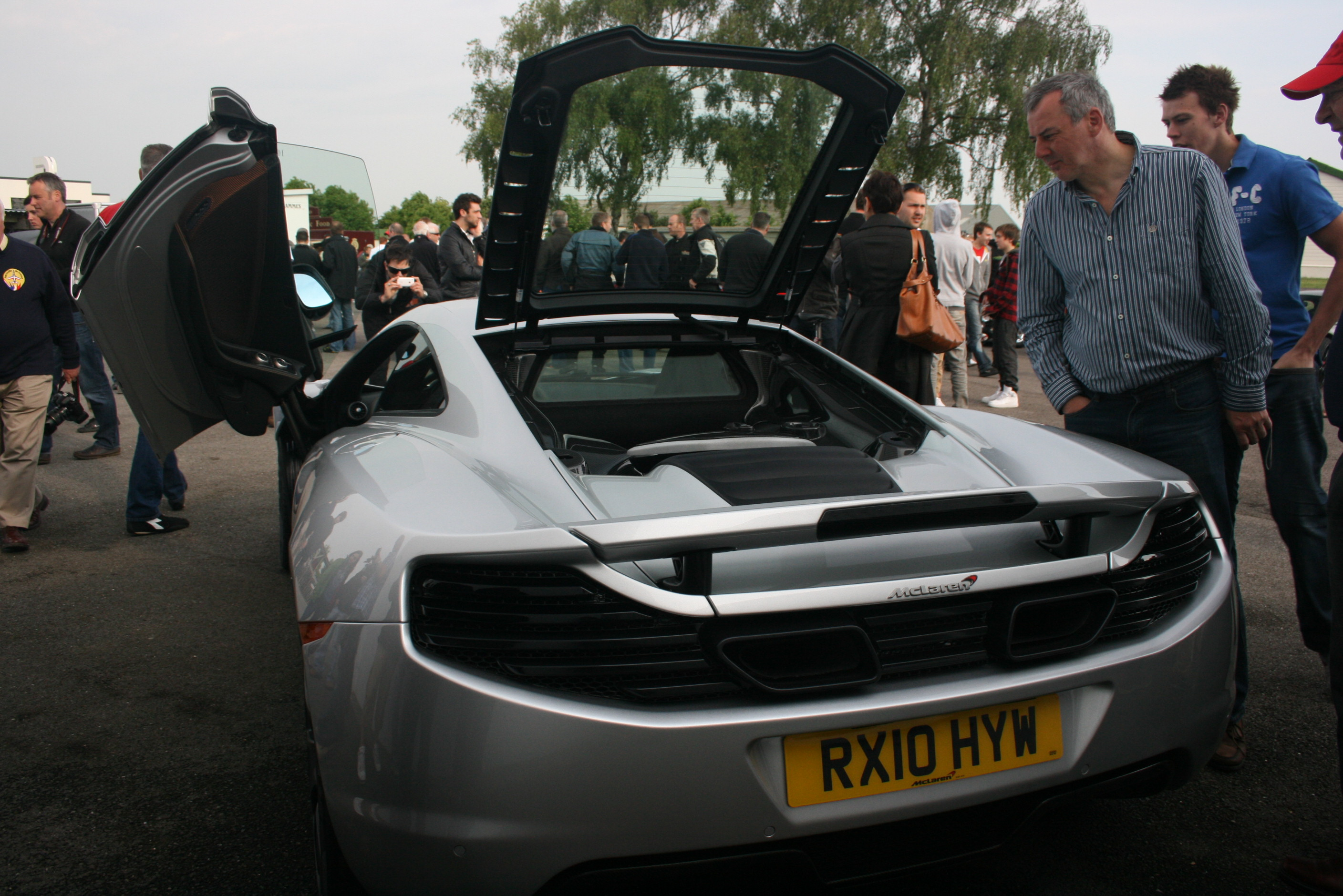 McLaren MP12C